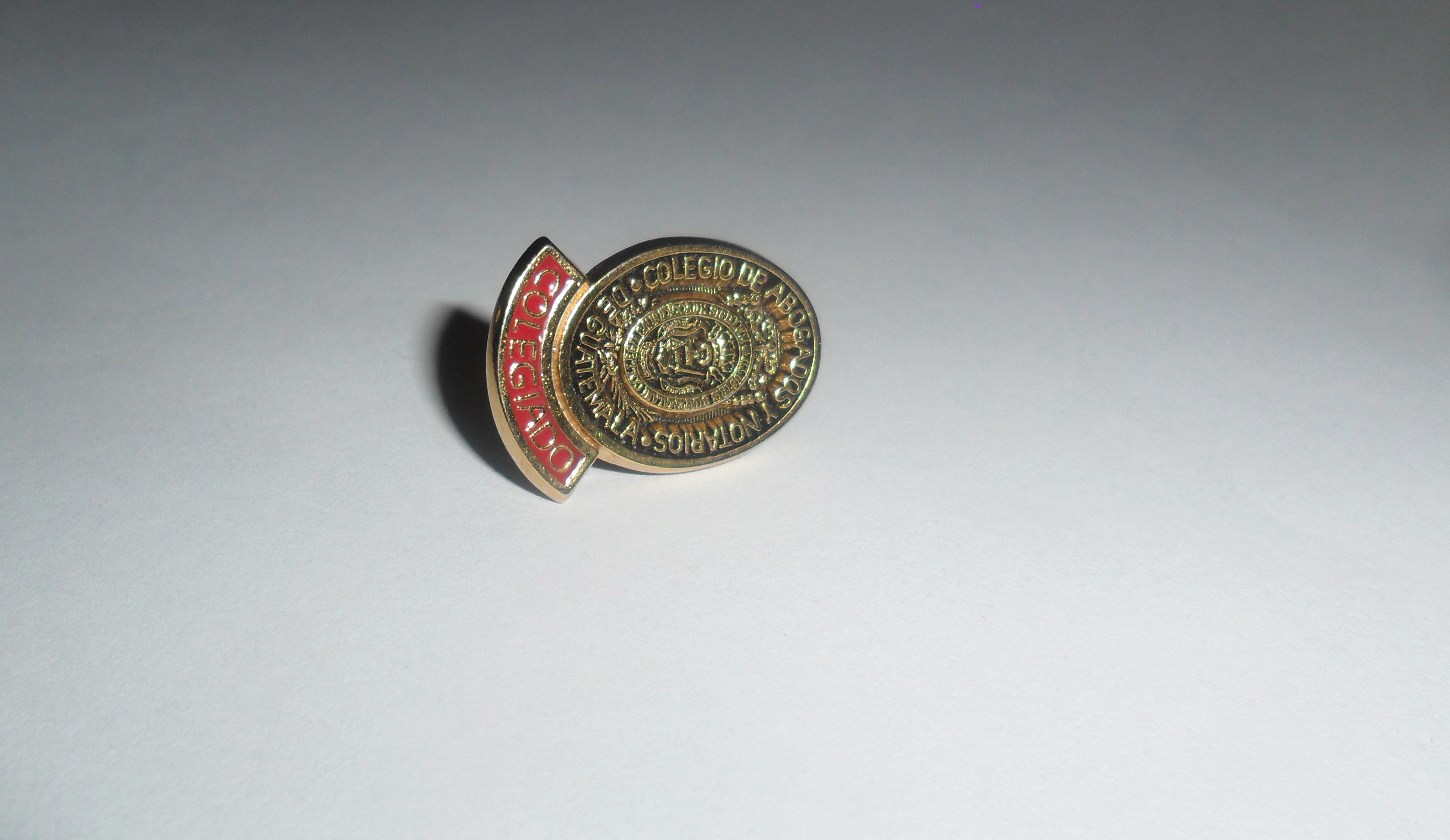 Pin abogado colegiado